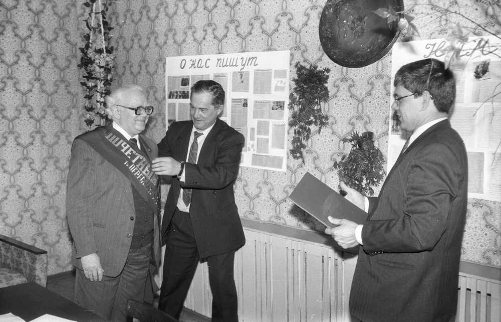 Иван Борисович Пуришев — архитектор-реставратор, профессор, член-корреспондент РААСН, писатель, создатель и сотрудник Переславской реставрационной мастерской. Решением Переславль-Залесской городской думы от 22 декабря 1995 года № 85 Ивану Борисовичу Пуришеву присвоено звание «Почётный гражданин города Переславля-Залесского». На выездном заседании городской думы в ЦСО «Надежда» 23 апреля 1997 года Александр Владимирович Моисеев (заведующий общим отделом городской Думы) надел на Ивана Борисовича Пуришева алую ленту почётного гражданина, а Александр Михайлович Дыма (председатель городской Думы) вручил диплом.